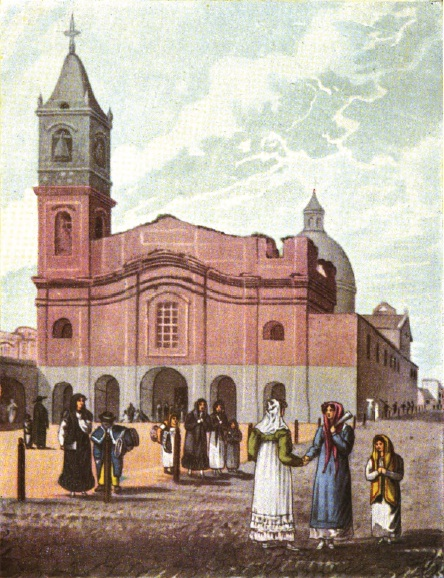 Vista de la Iglesia de Santo Domingo, en la ciudad de Buenos Aires. El edificio aún existe, concluido y modificado, en la esquina de Avenida Belgrano y la calle Defensa.